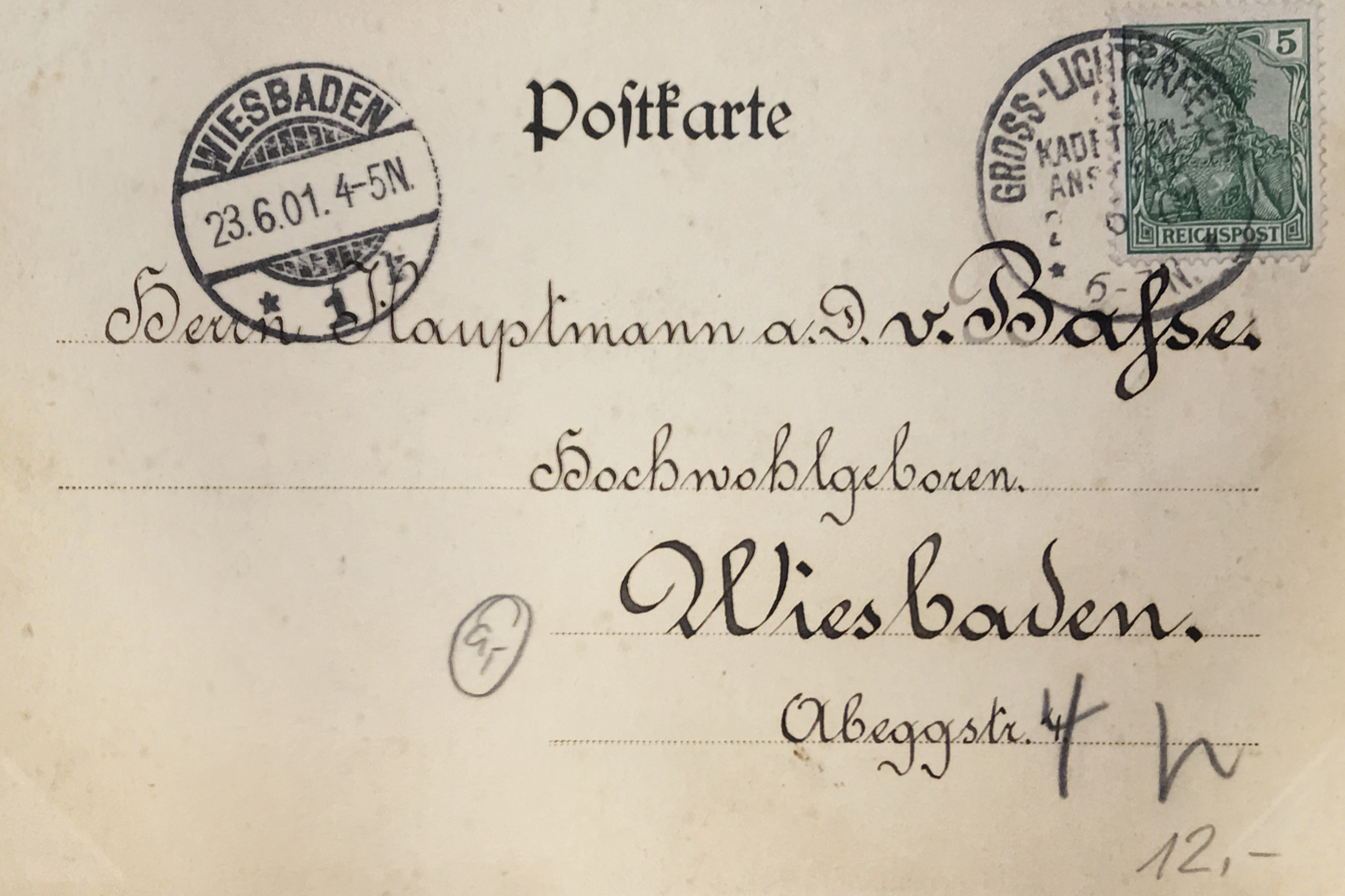 Postkarte eines Absenders in der Hauptkadettenanstalt Lichterfelde-Ost an einen Hochwohlgeborenen